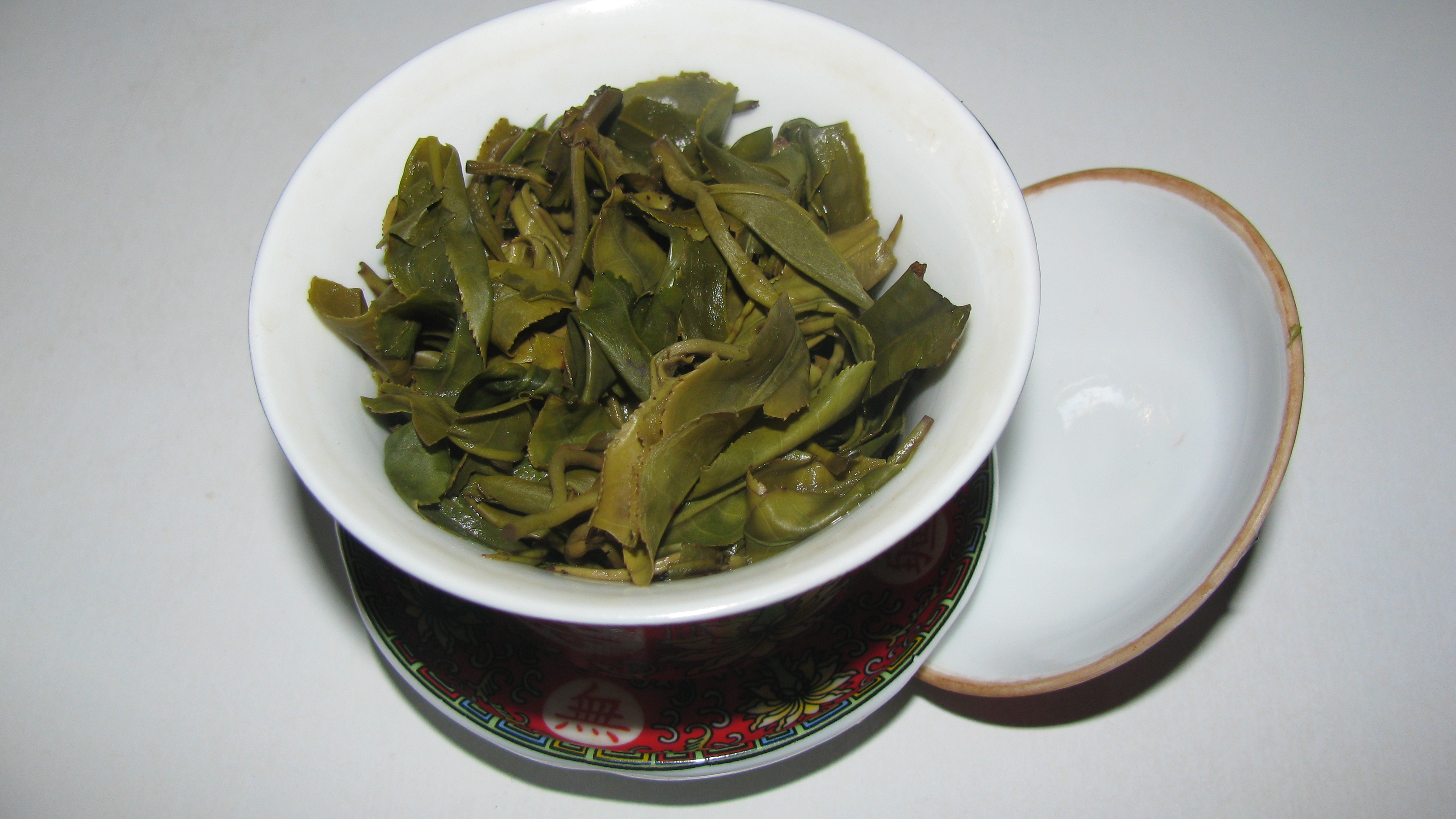 Гайвань с заваренным Би Ло Чунь, сбора 2012 года.